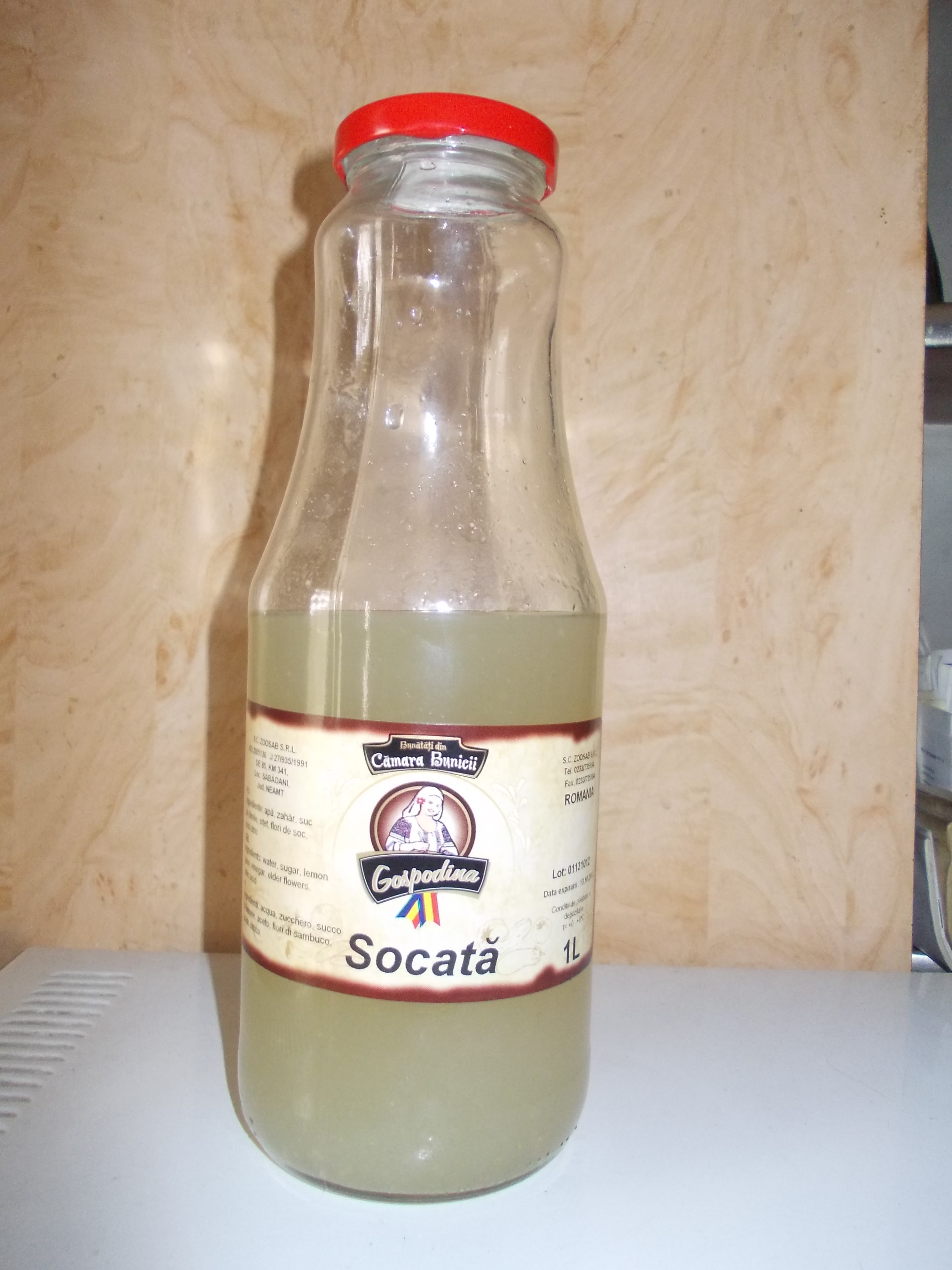 botella de socată